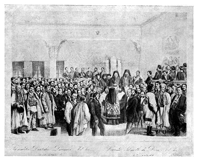 Divanul ad-hoc